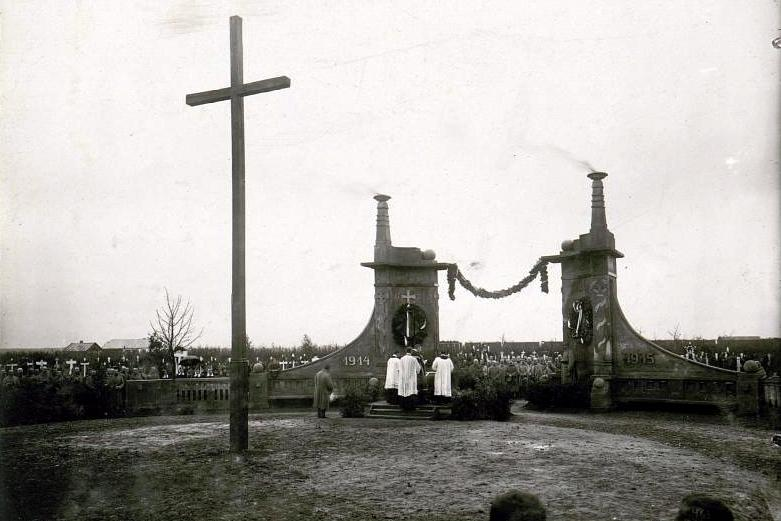 Allerseelenfeier am Heldenfriedhof in Stryj, von Truppen ausgeführtes baukünstlerisches Tor.